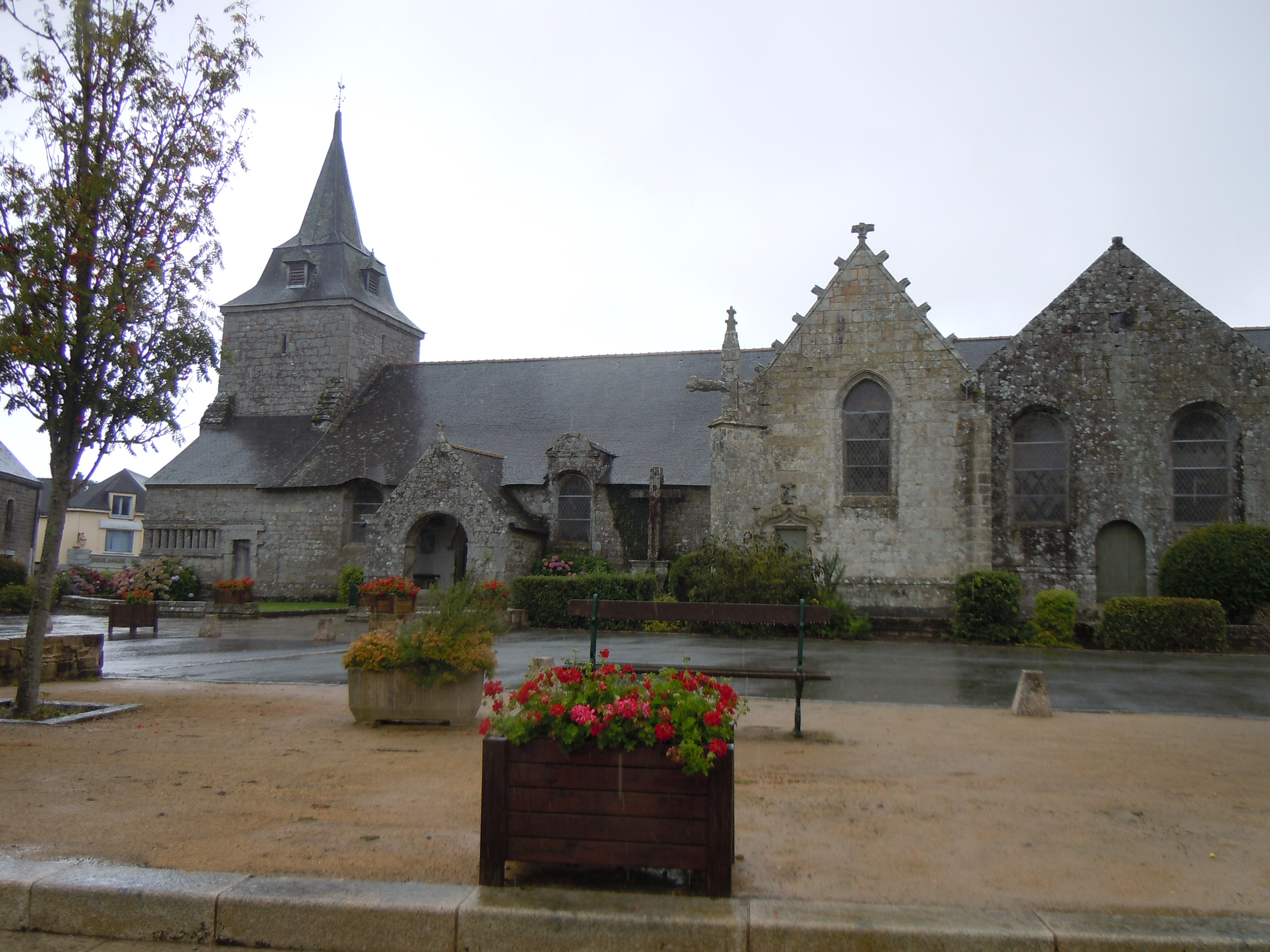 église Saint-Pierre, commune de Ploërdut, département du Morbihan, France